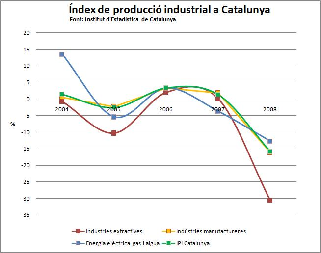 IPI Catalunya